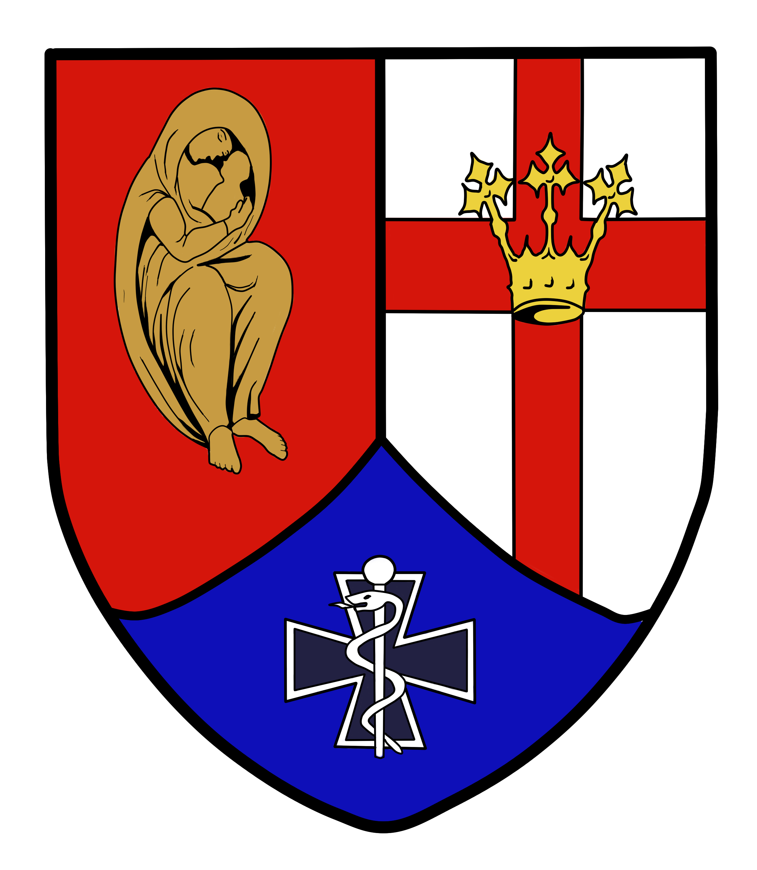 Die Datei stellt das, seit dem 27.10.2016 durch das Kommando Sanitätsdienst der Bundeswehr gebilligte, Wappen des Sanitätsregiments 2 dar. Sowohl das Wappen selbst als auch seine Bestandteile unterliegen keinen Urheberrechten (siehe z.B. die Wikipedia-Artikel der Schwesterverbände, wie Sanitätsregiment 1). Der Urheber des Bestandteils auf der oberen,linken Seite (Madonna von Stalingrad; Kurt Reuber) ist vor über 70 Jahren verstorben.